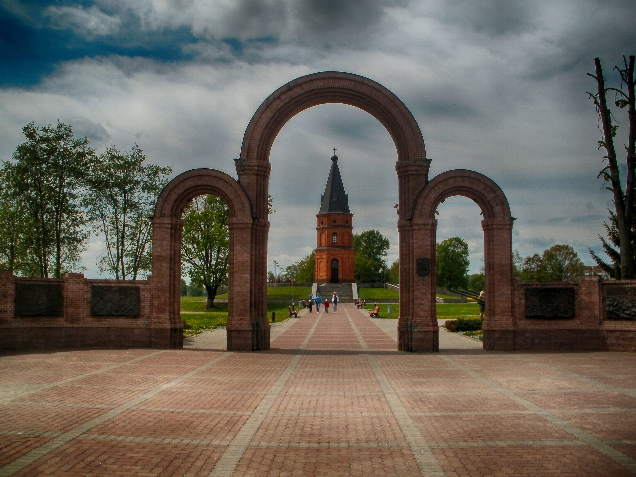 Беларуская (тарашкевіца): Мэмарыяльны комплекс -Буйницкае поле